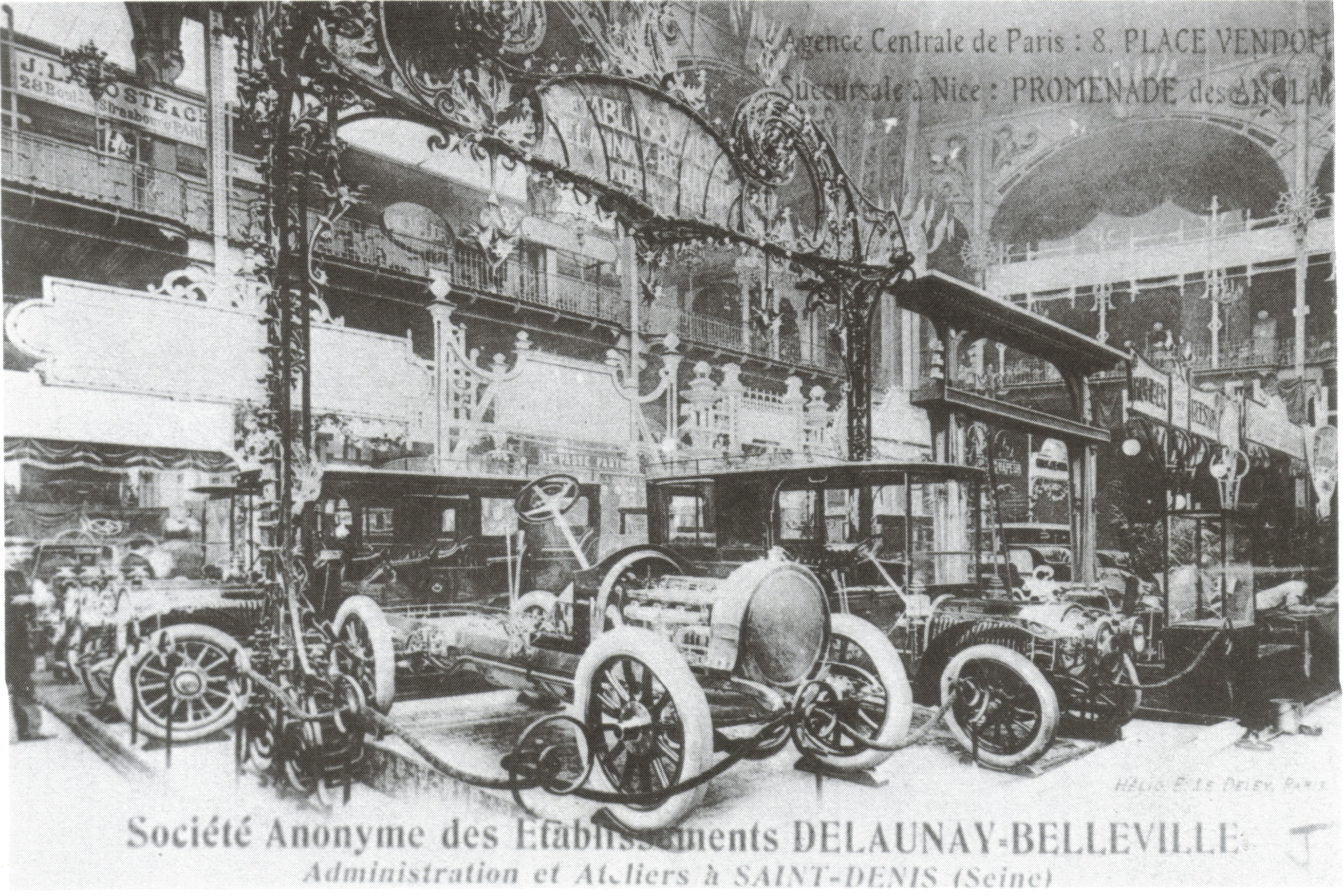 carte ancienne des Etablissements Delaunay-Belleville à Saint-Denis